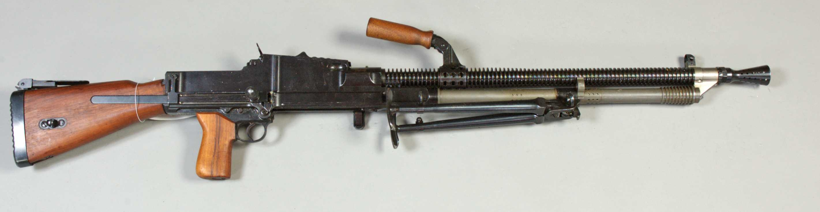 Största skottvidd: 4.500 m. Mekanisk elhastighet: 8 sk/sek. Ursprungligen tjeckoslovakisk m/1926, inköpta till Sverige 1939, där de 7,9 mm utbytes mot 6,5 mm kaliber.